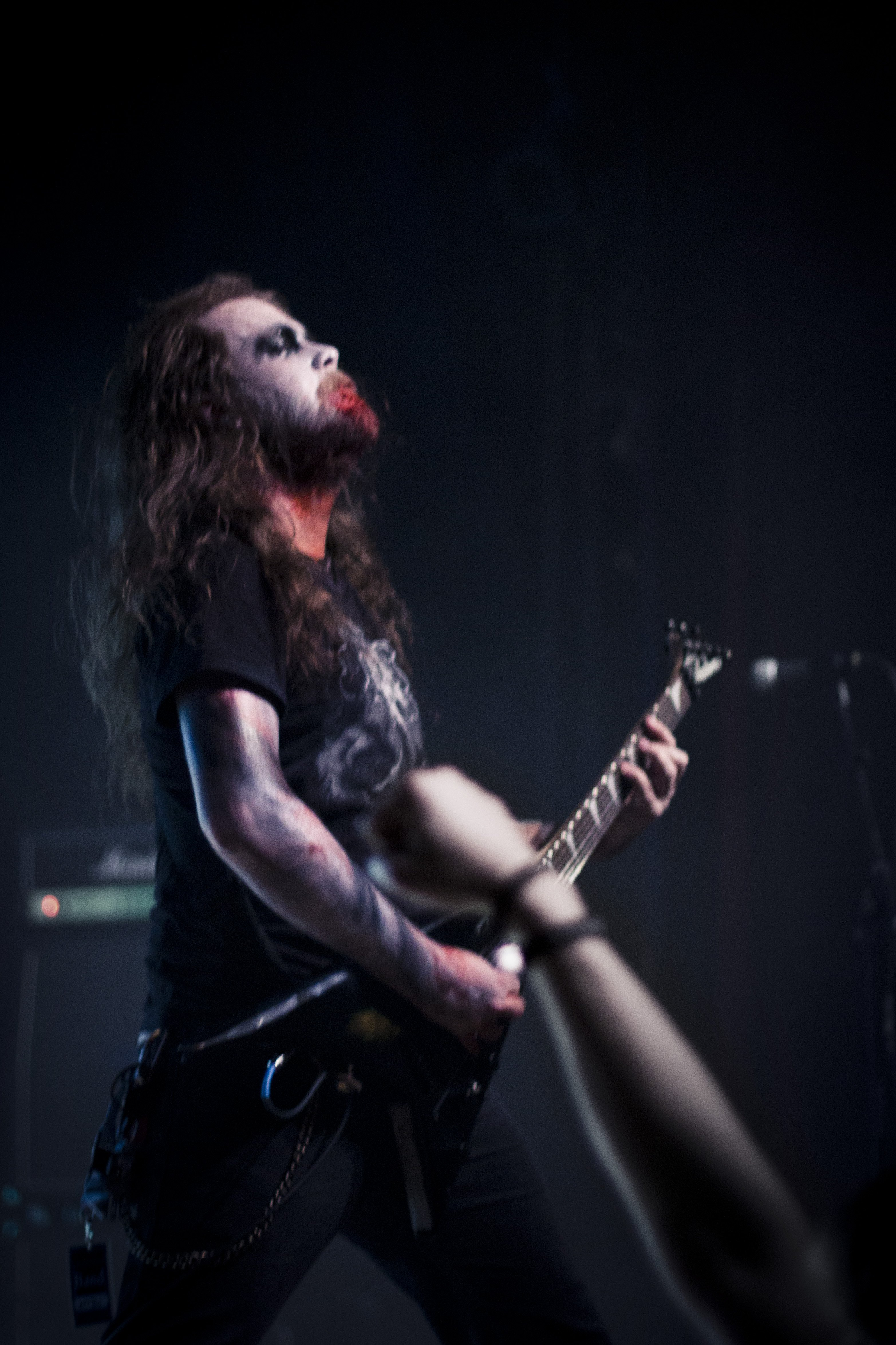 Adam Cook du groupe de unblack A Hill to Die Upon au Elements of Rock 2012.